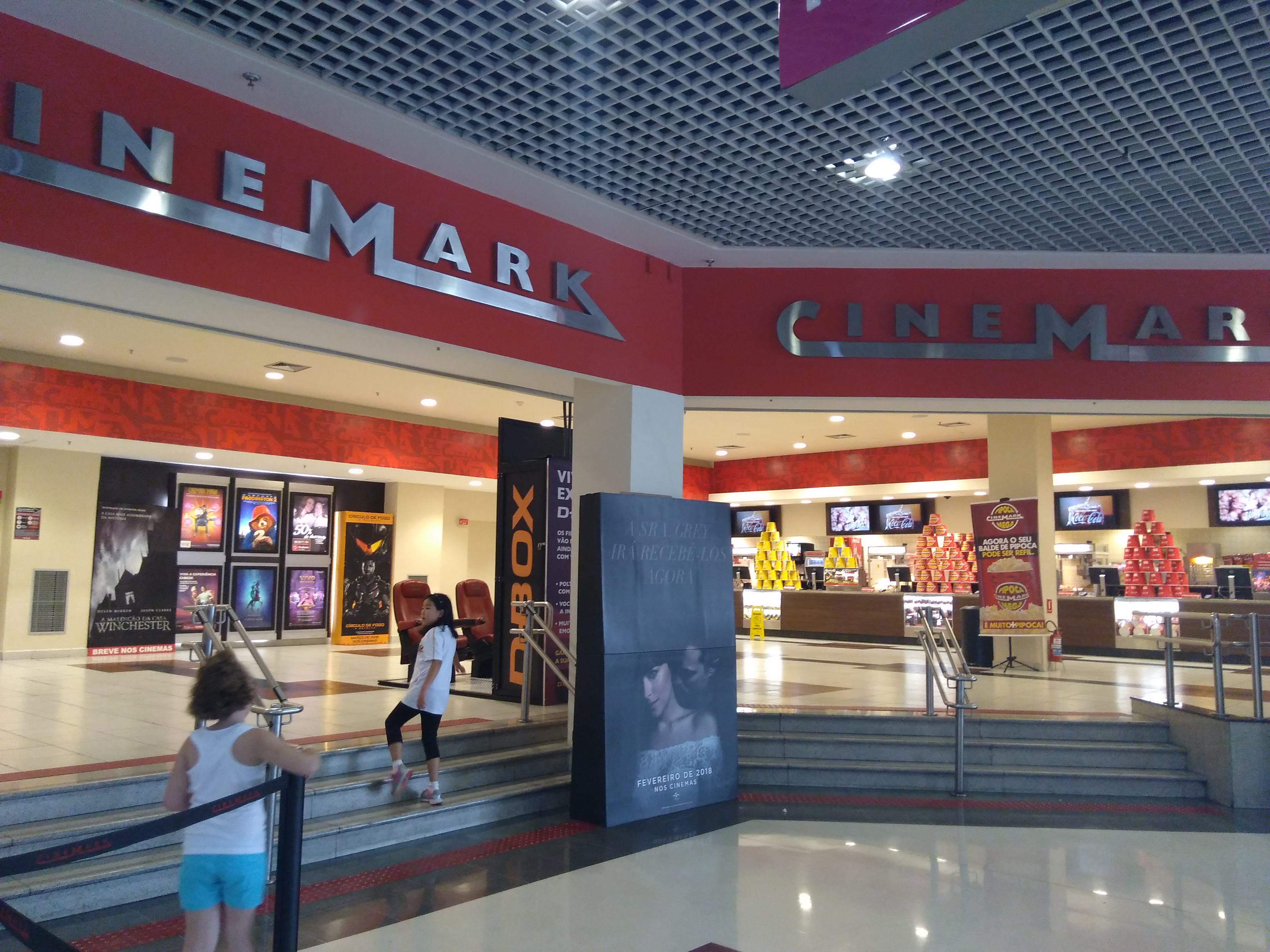 Vista externa do Cinemark Boulevard Tatuapé de São Paulo, SP